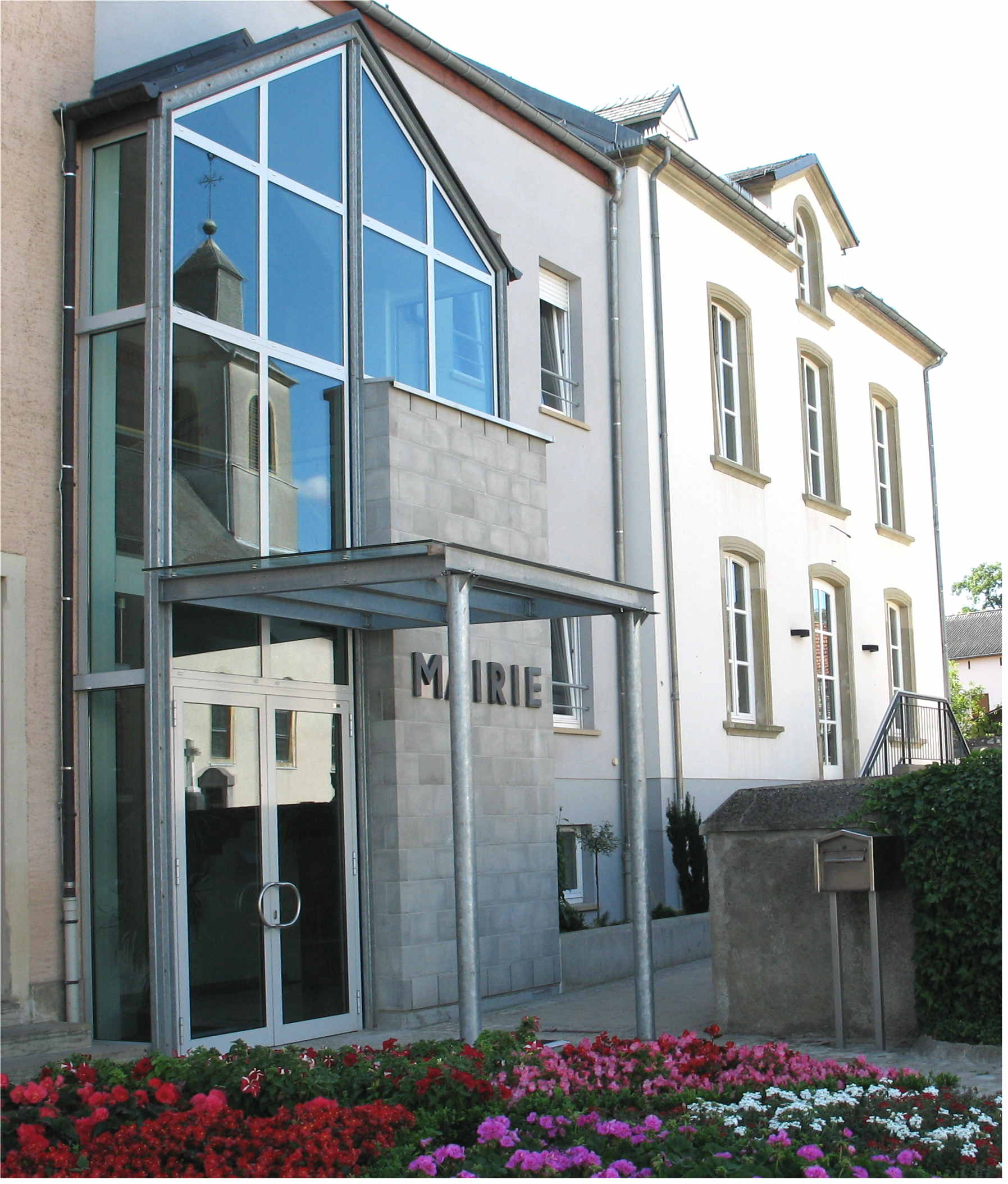 D'Gemeng vu Fluessweiler Kategorie:Gemeng Fluessweiler